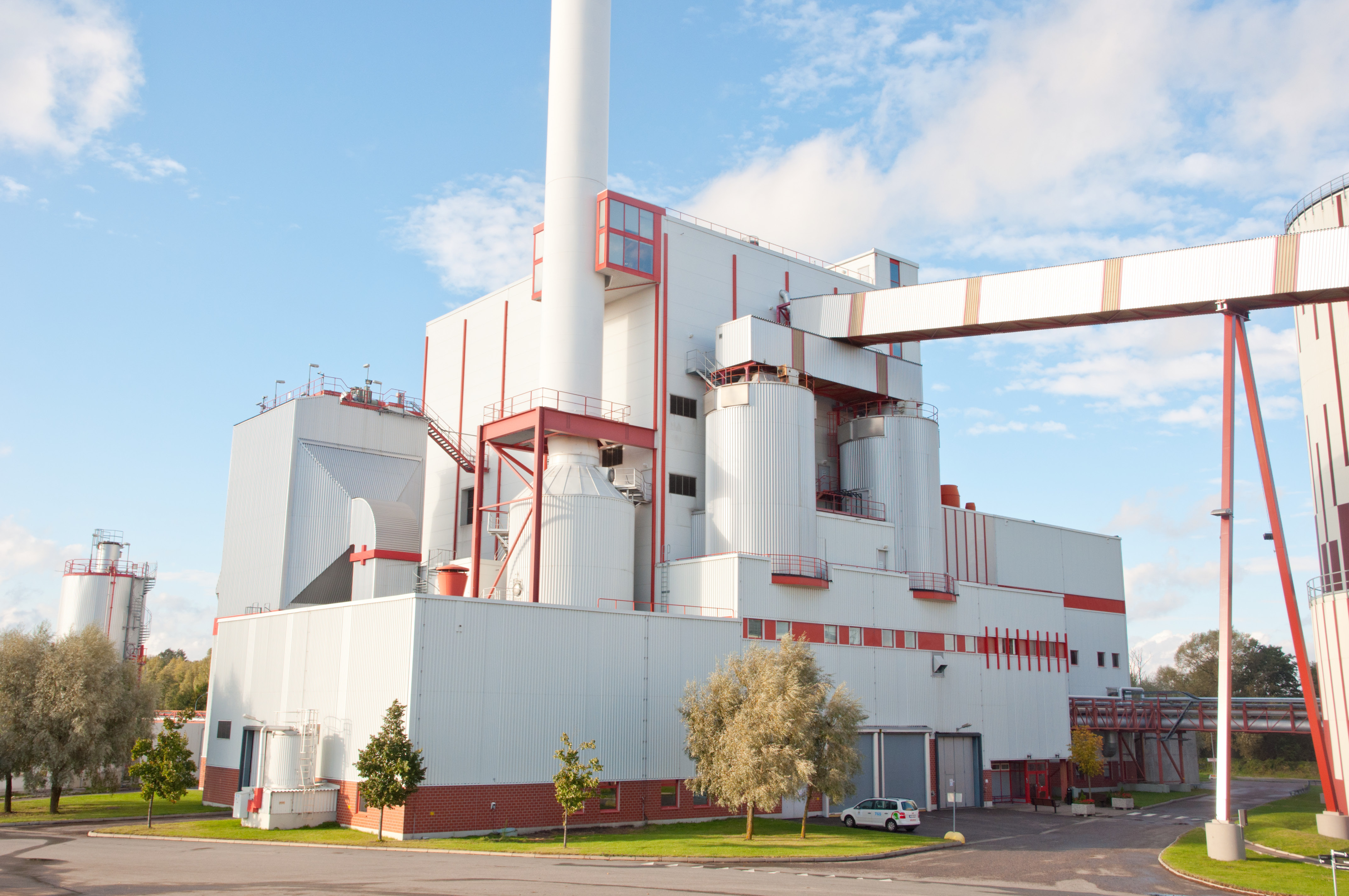 Eskilstuna energi och miljös kraftvärmeverk.